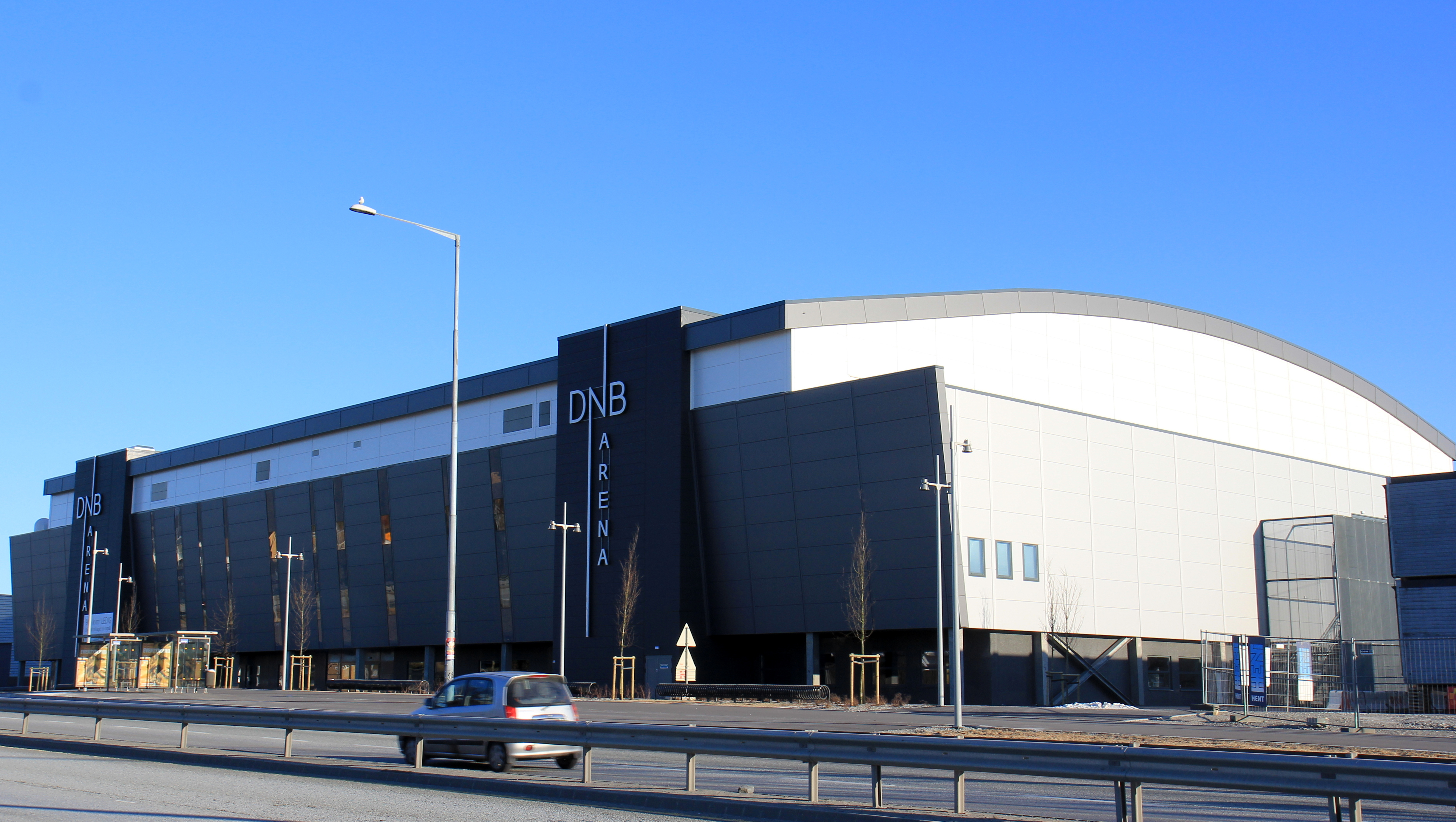 DNB Arena, Stavanger